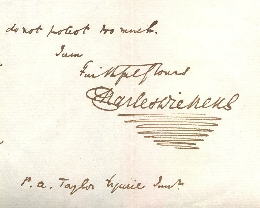 Charles Dickens, Autograph (ausgeschnitten aus einem Brief), ohne Ort, ohne Datum